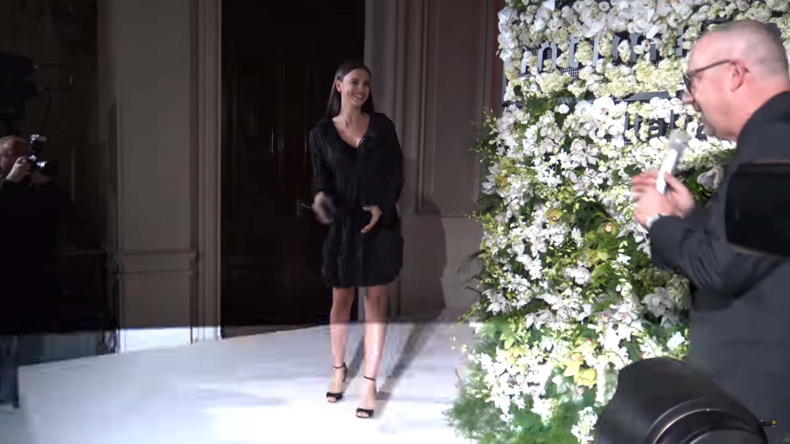 Intimissimi cumple 20 años y lo celebra por todo lo alto en Madrid con la visita de la cotizada modelo rusa: Irina Shayk.